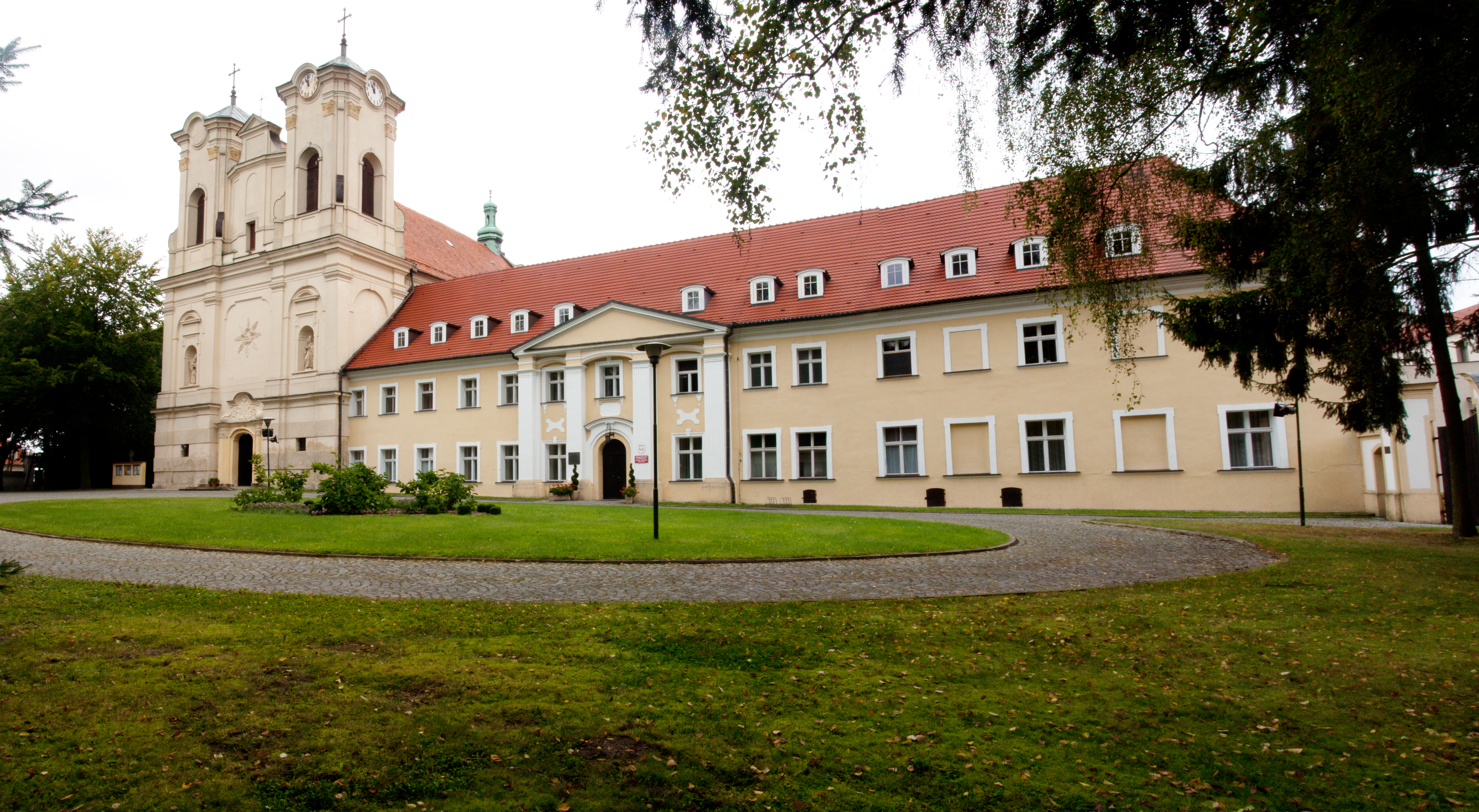 Obra - zespół klasztorny cystersów, ob. misjonarzy oblatów: kościół pw. św. Jakuba Apostoła z lat 1722-1757, klasztor z 1618, 1753-55, 1920 (zabytek nr 306)